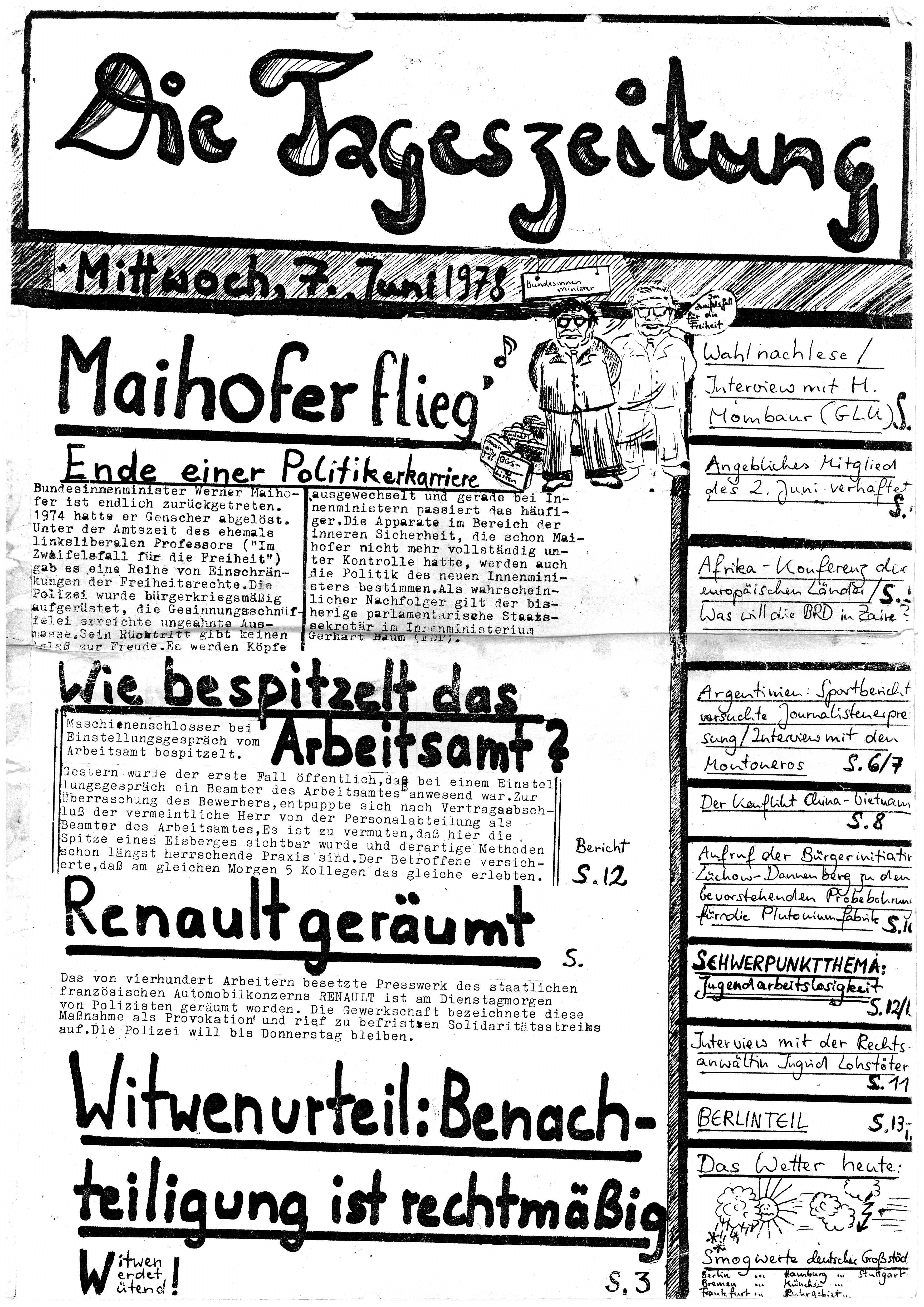 Seite 1 der „Spielnummer“ der Zeitung „Die Tageszeitung“ vom 7. Juni 1978 von Ute Scheub